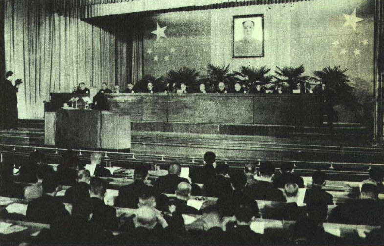 1953年10月中华全国工商业联合会代表大会